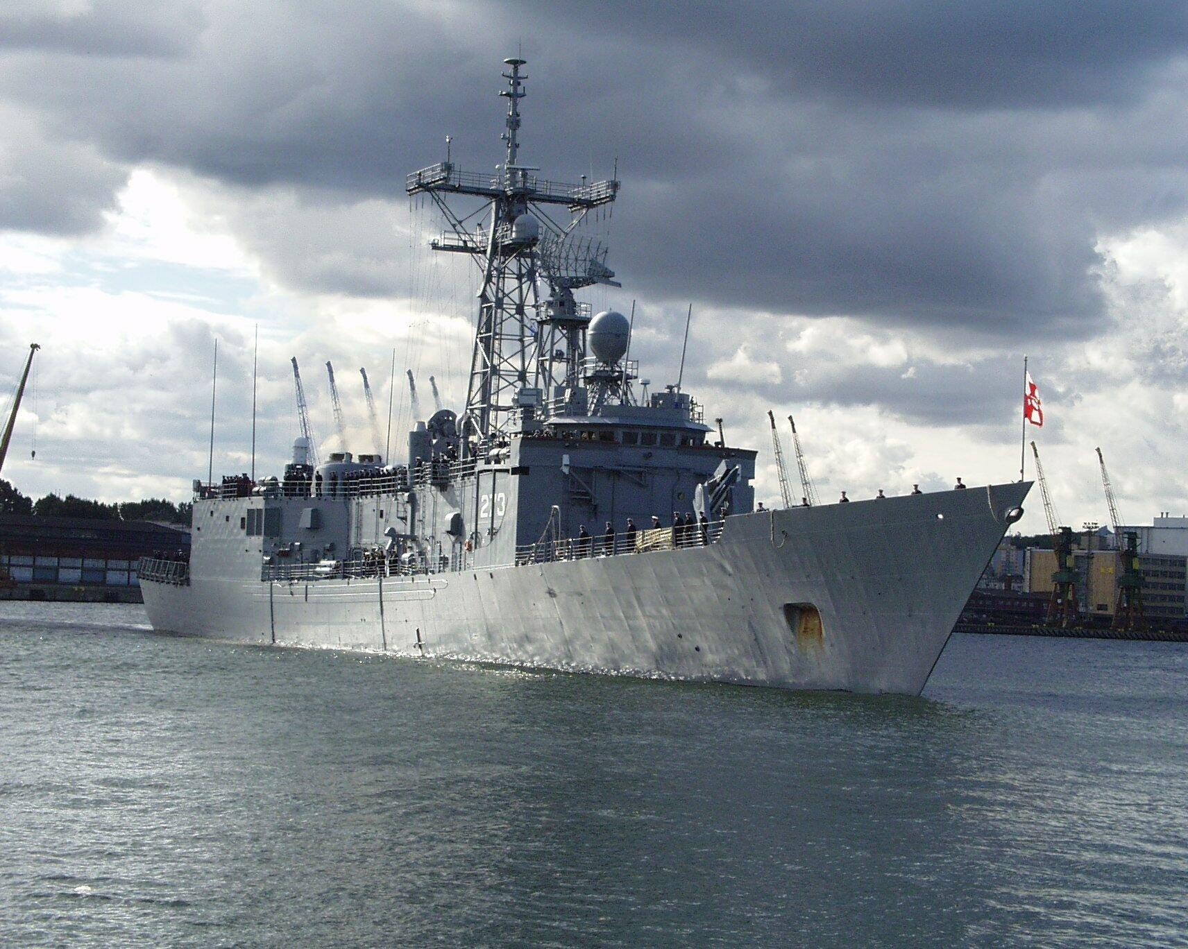 Polska Fregata Rakietowa Gen. T. Kościuszko